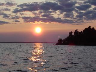 Coucher de soleil au lac Saint-Jean secteur Lac Askeen